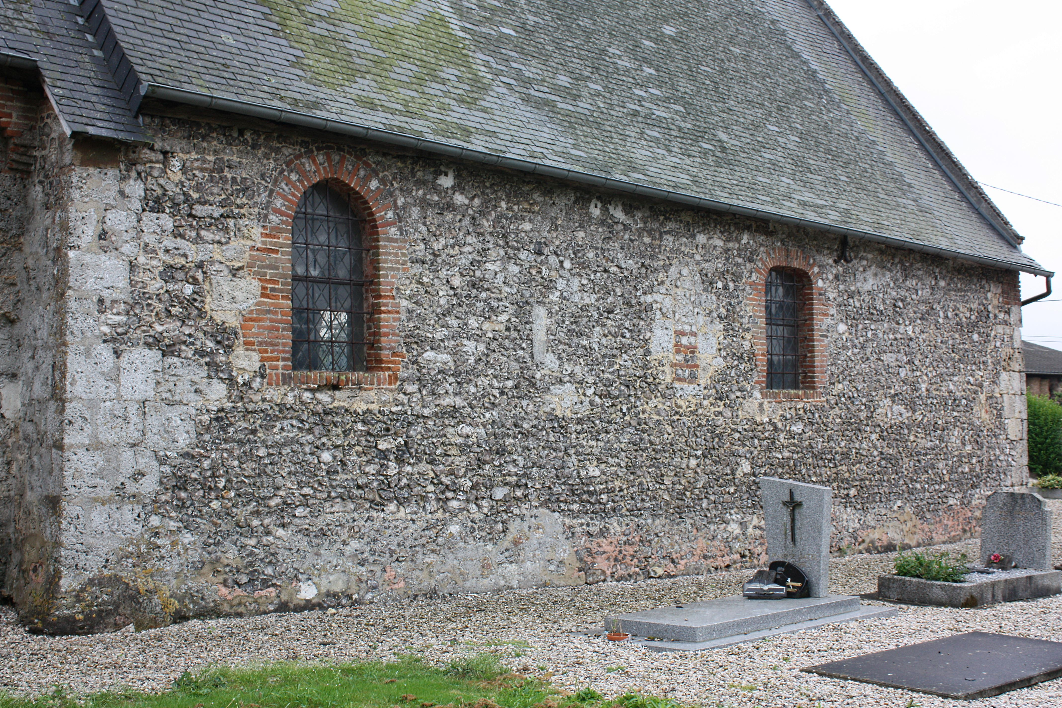 Criquetot-sur-Longueville - Eglise Saint-Julien